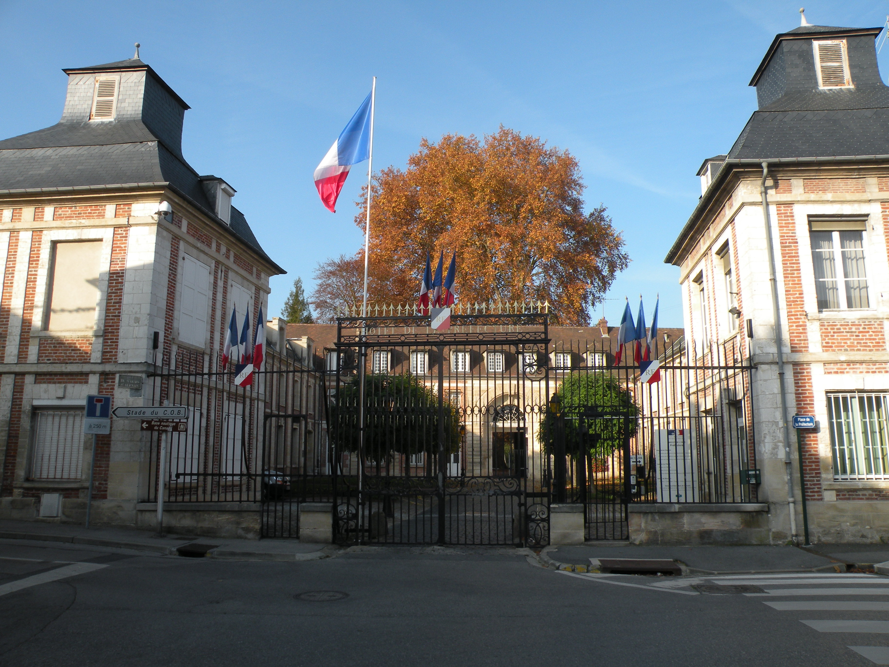 Préfecture de Beauvais, Abbaye Saint-Quentin